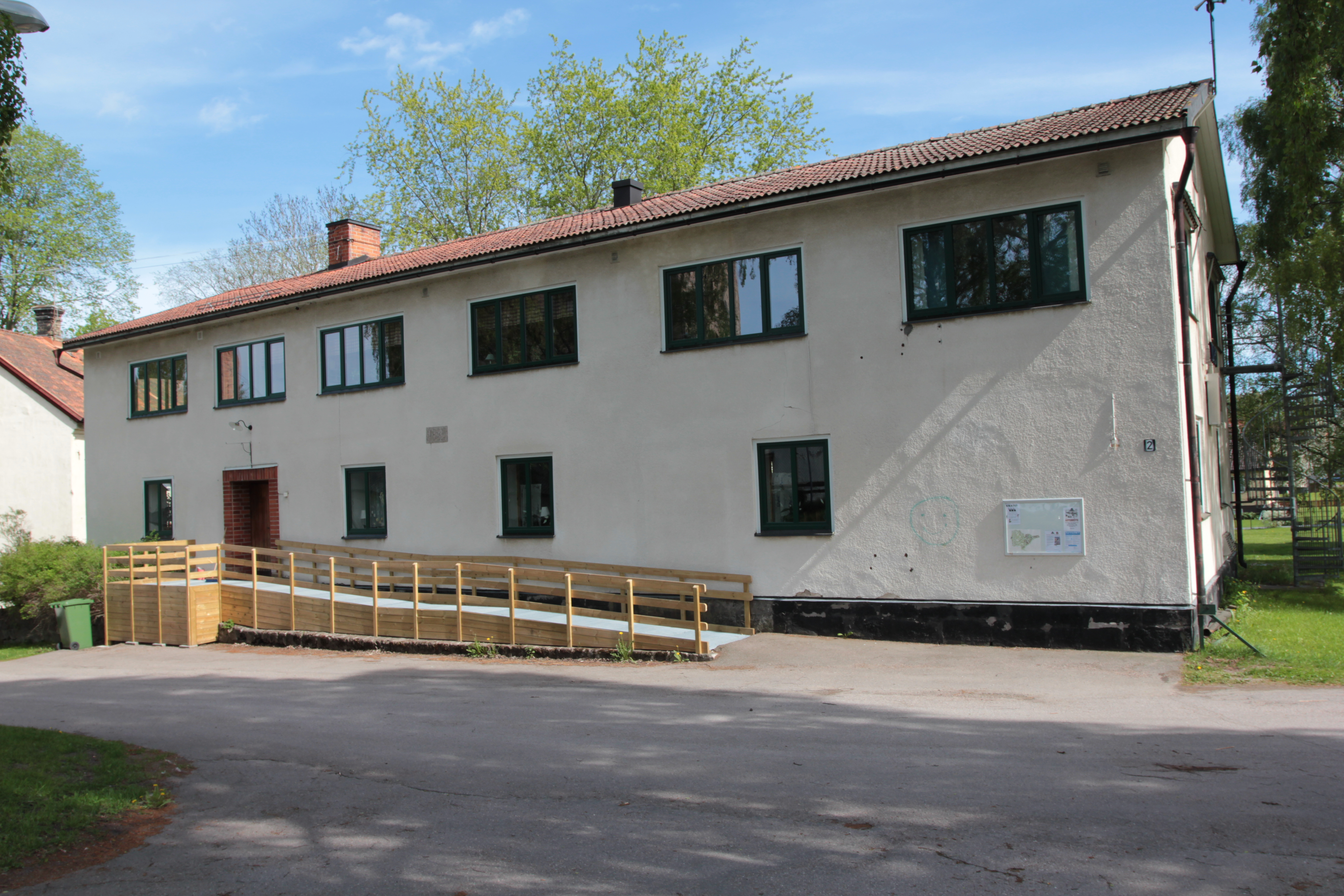 Området vid gamla järnbruket och Monarkfabriken i Tobo. Monarks kontor, ursprungligen byggt som snickeri. Numera Tobo Folkets Hus, sedan 1985. Foto uppladdat som en del i Bergslagssafarin 26 maj 2012.